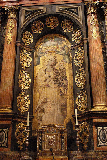 La imagen de la Virgen de la Antigua, de finales del siglo XIV, en el centro del retablo de la capilla de la Virgen de la Antigua de la catedral de Sevilla, (España).